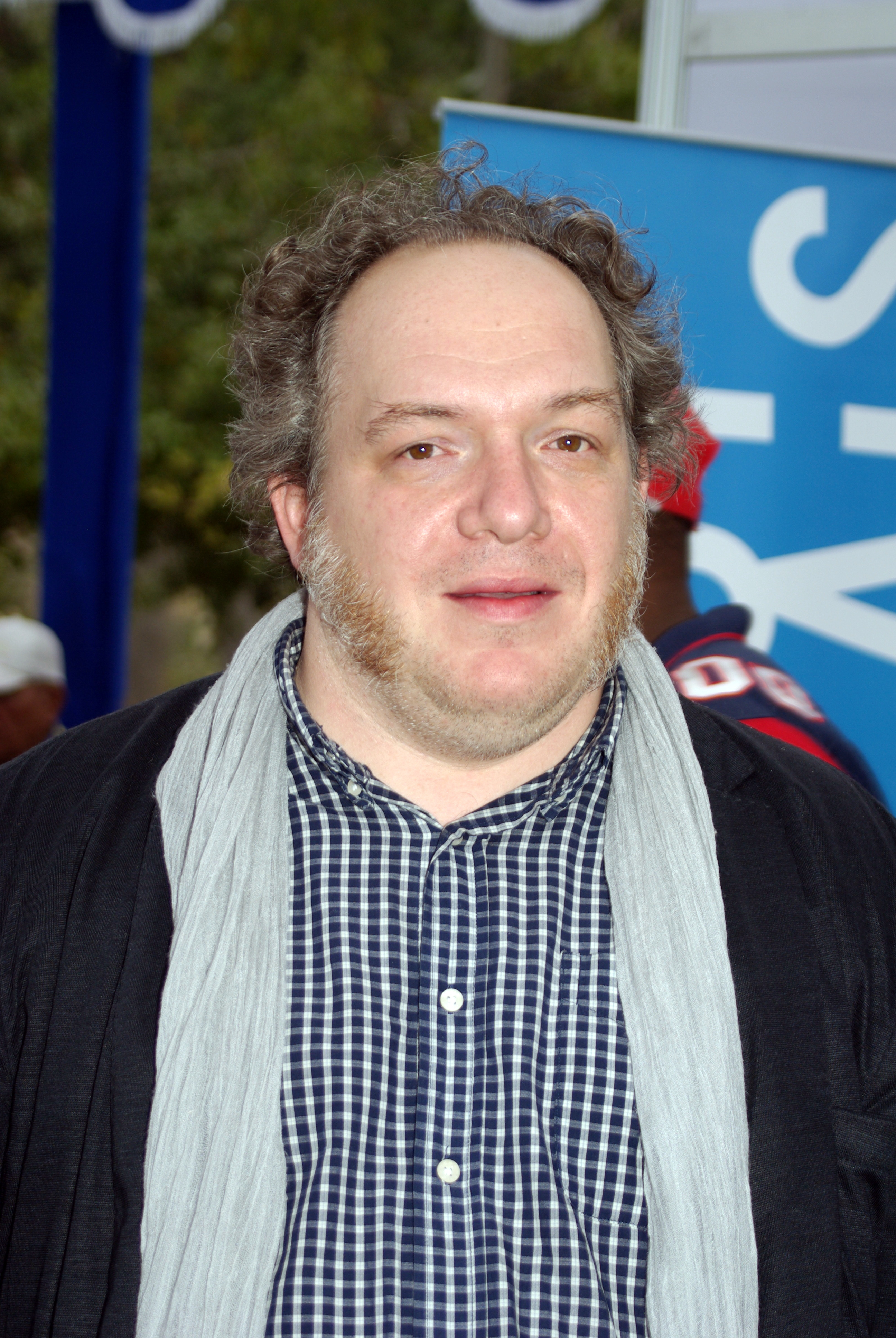 El escritor francés Mathias Enard en la Fiesta del Libro de la Plaza de Armas de Santiago, abril, 2013